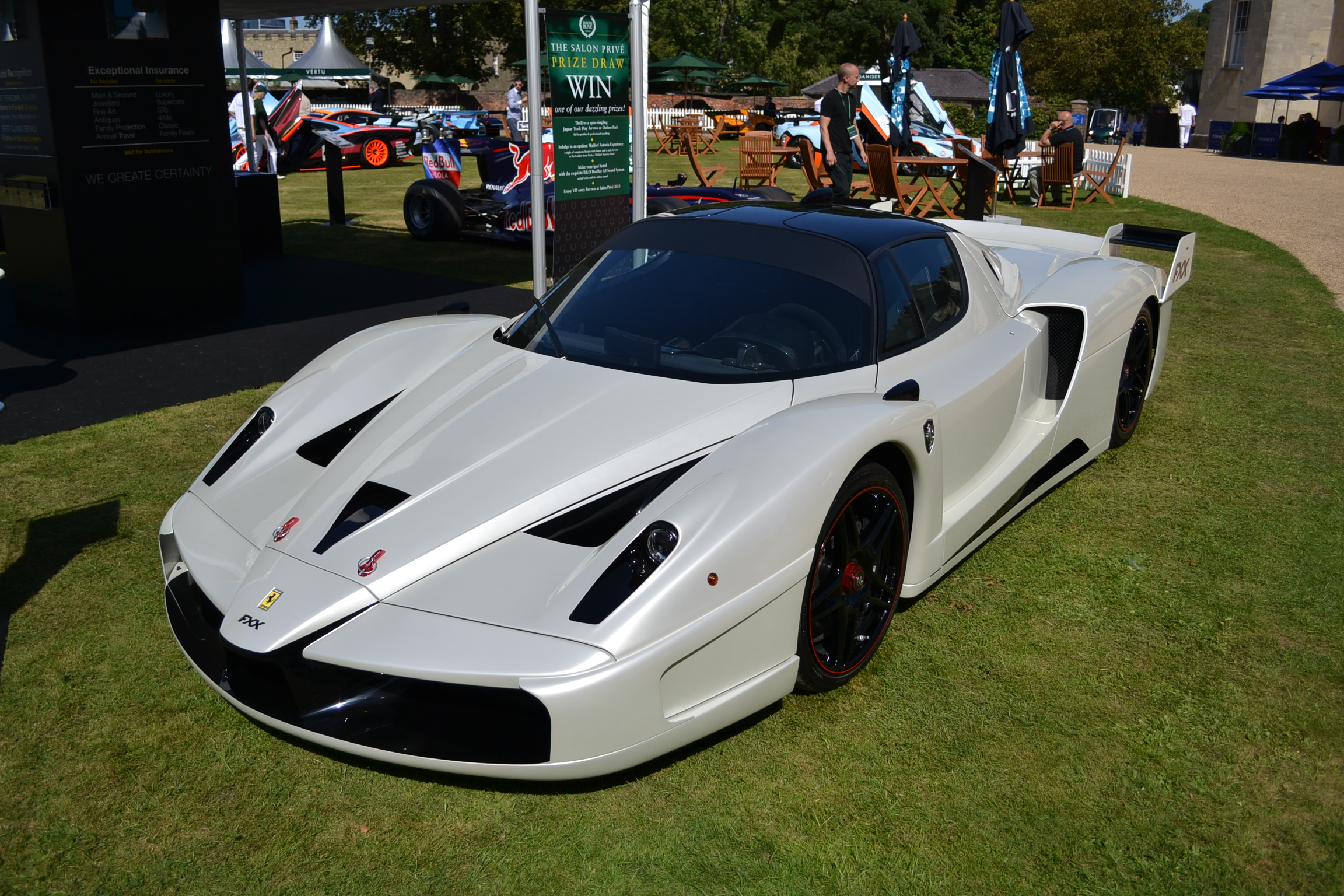 Salon Privé London 2012